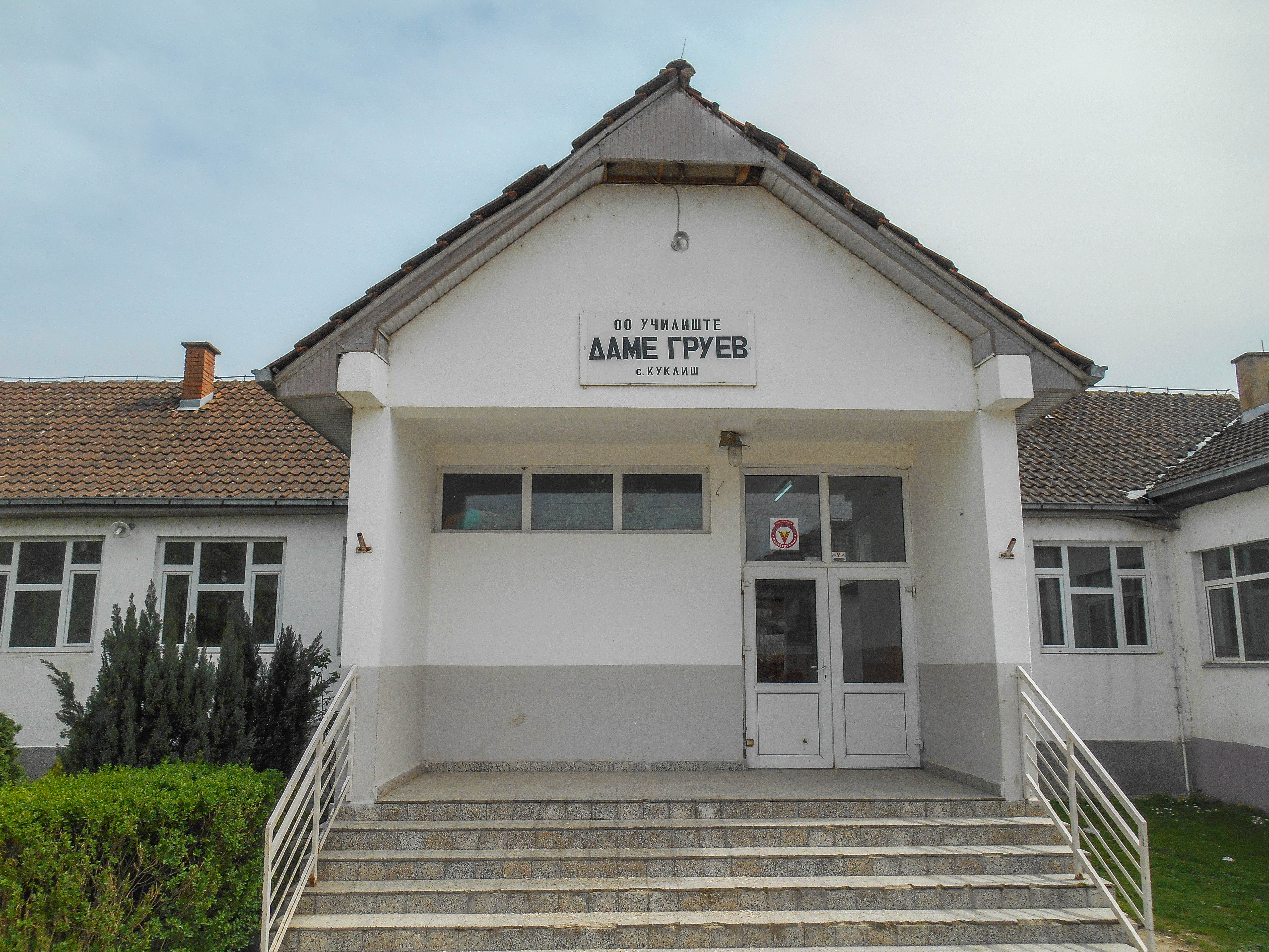 Основно училиште „Даме Груев“ - Куклиш